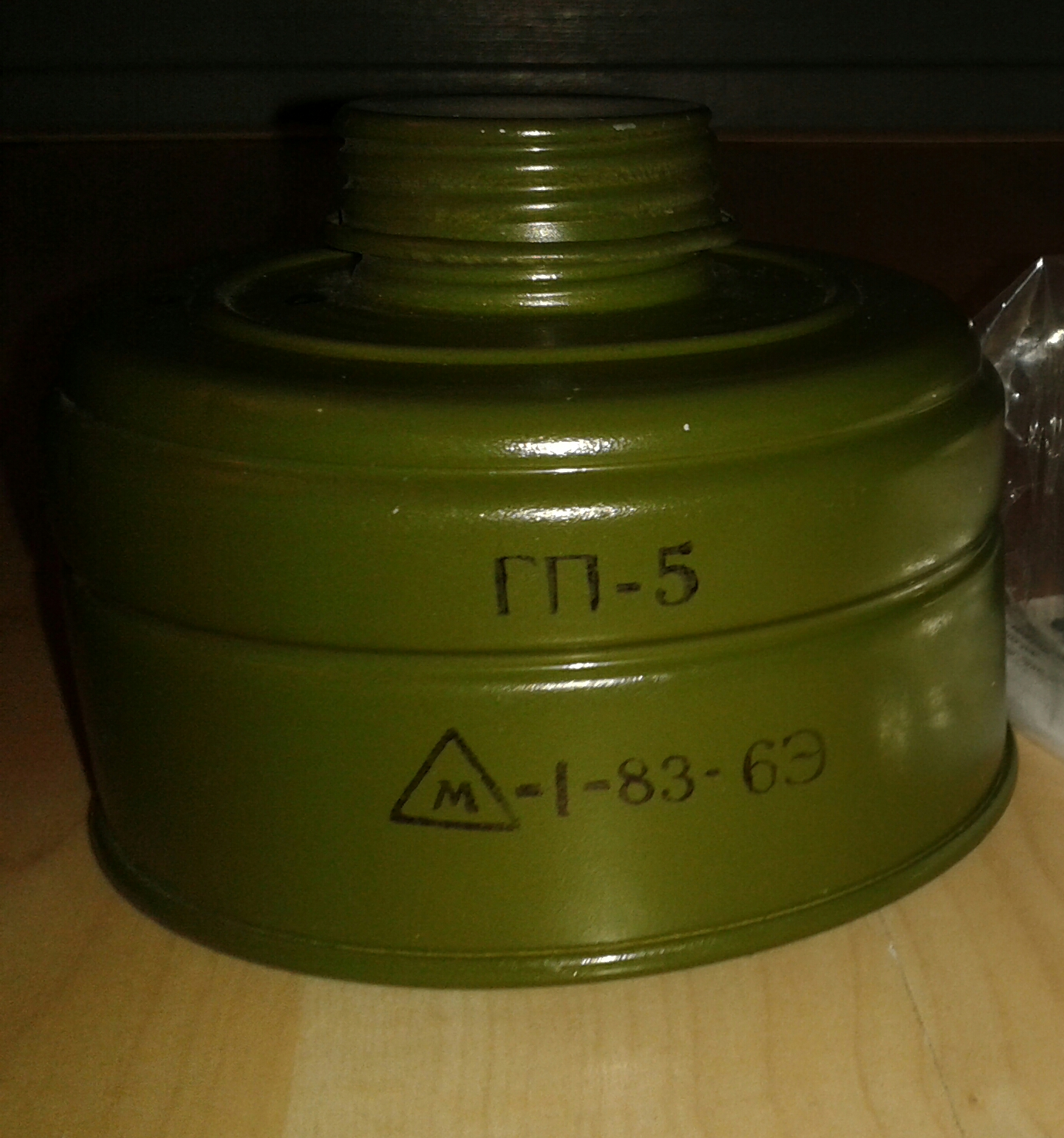 This filter contains Asbestos